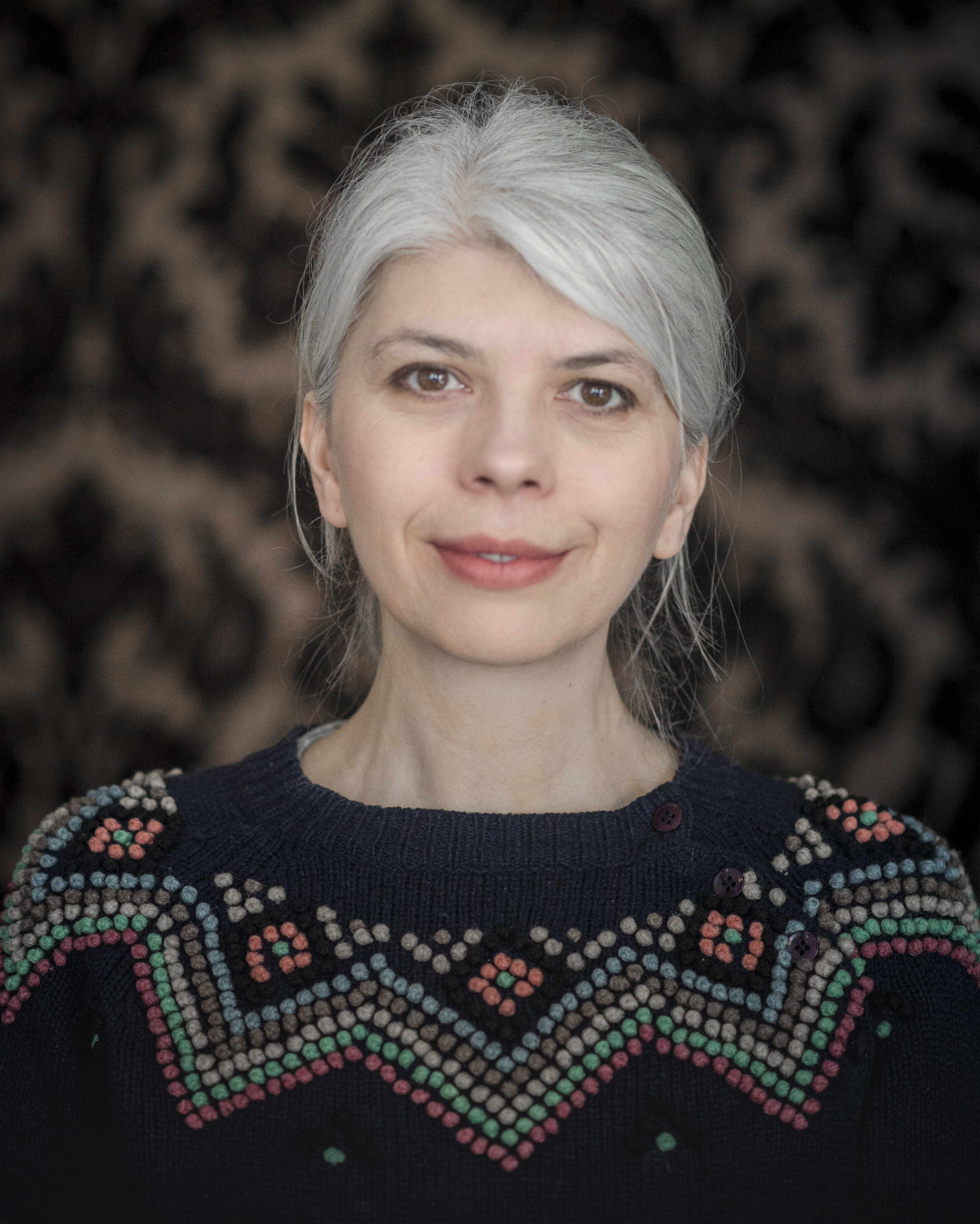 Marica Bodrožić. Portrait aufgenommen am 12.1.2016